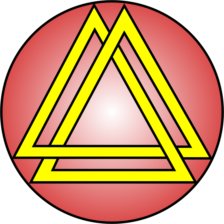 Символ Спортивного клуба "Бусидо" (Москва)